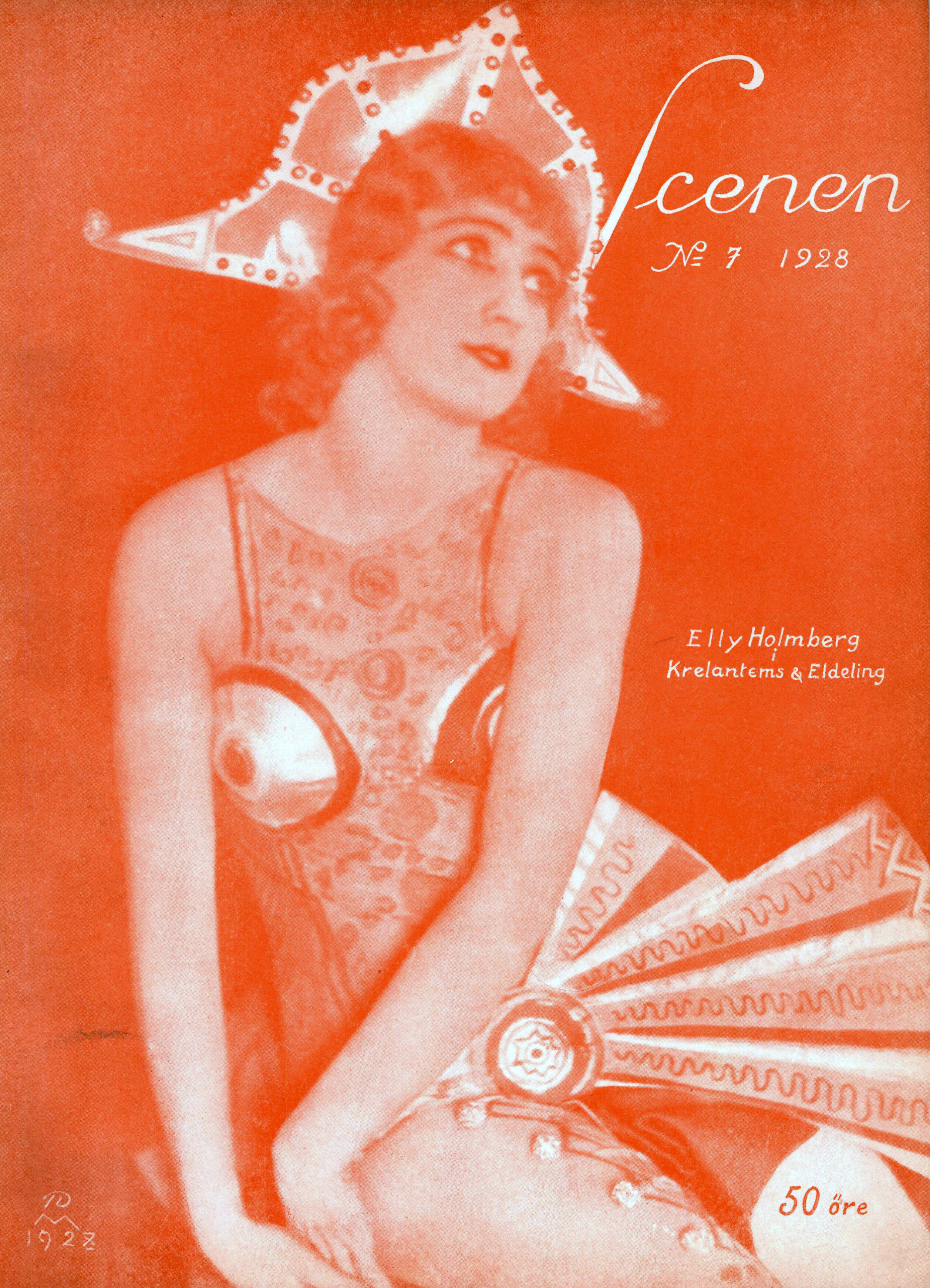 Elly Holmberg (1903-2001) i baletten Krelantems och Eldeling. Foto på omslaget till Scenen 1928.